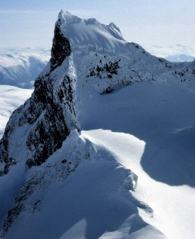 Store Austanbotntind sett fra Store Ringstind, påsken 1984.